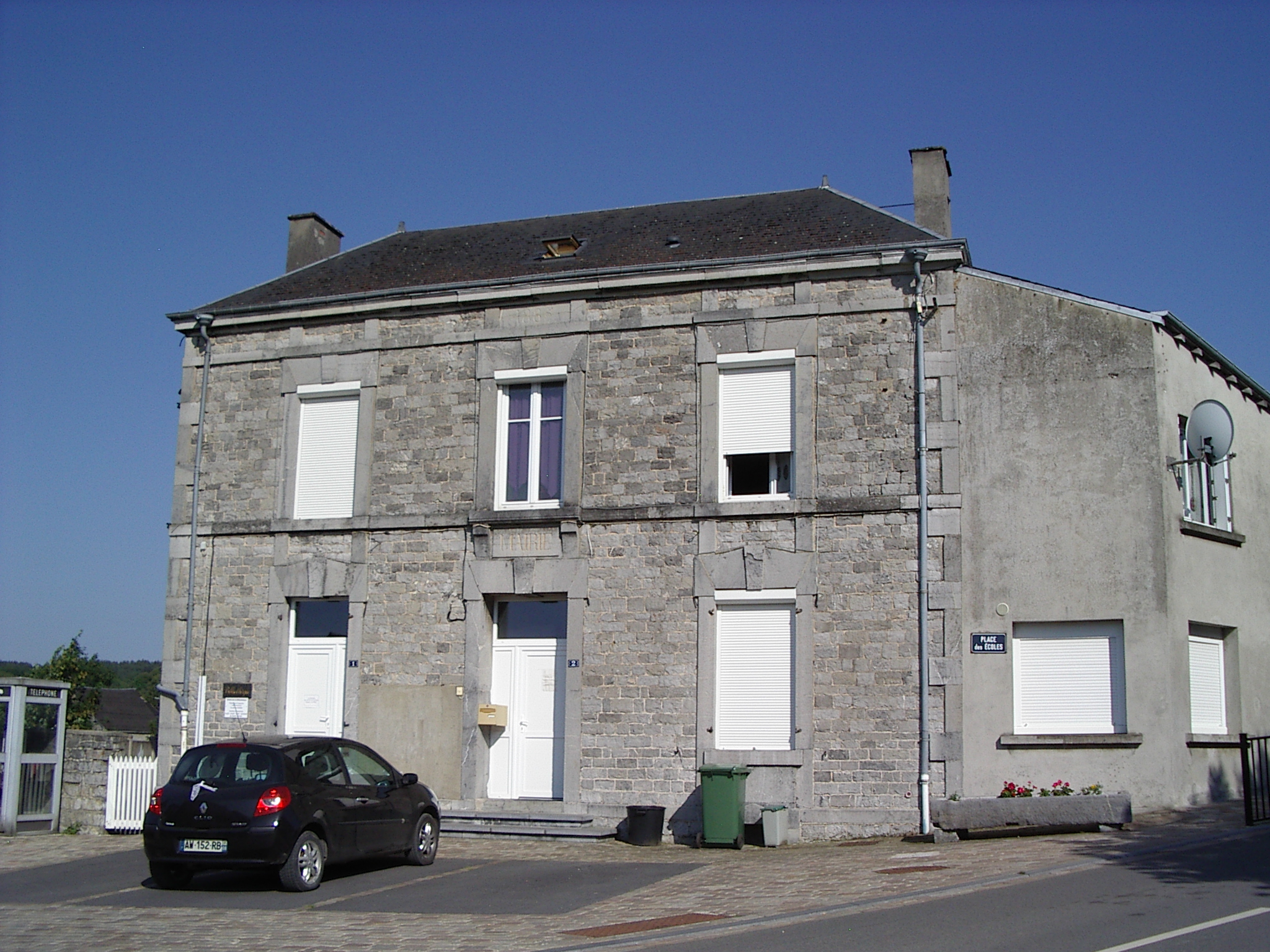 Mairie de Rancennes , commune française, située dans le département des Ardennes de la région Champagne-Ardenne